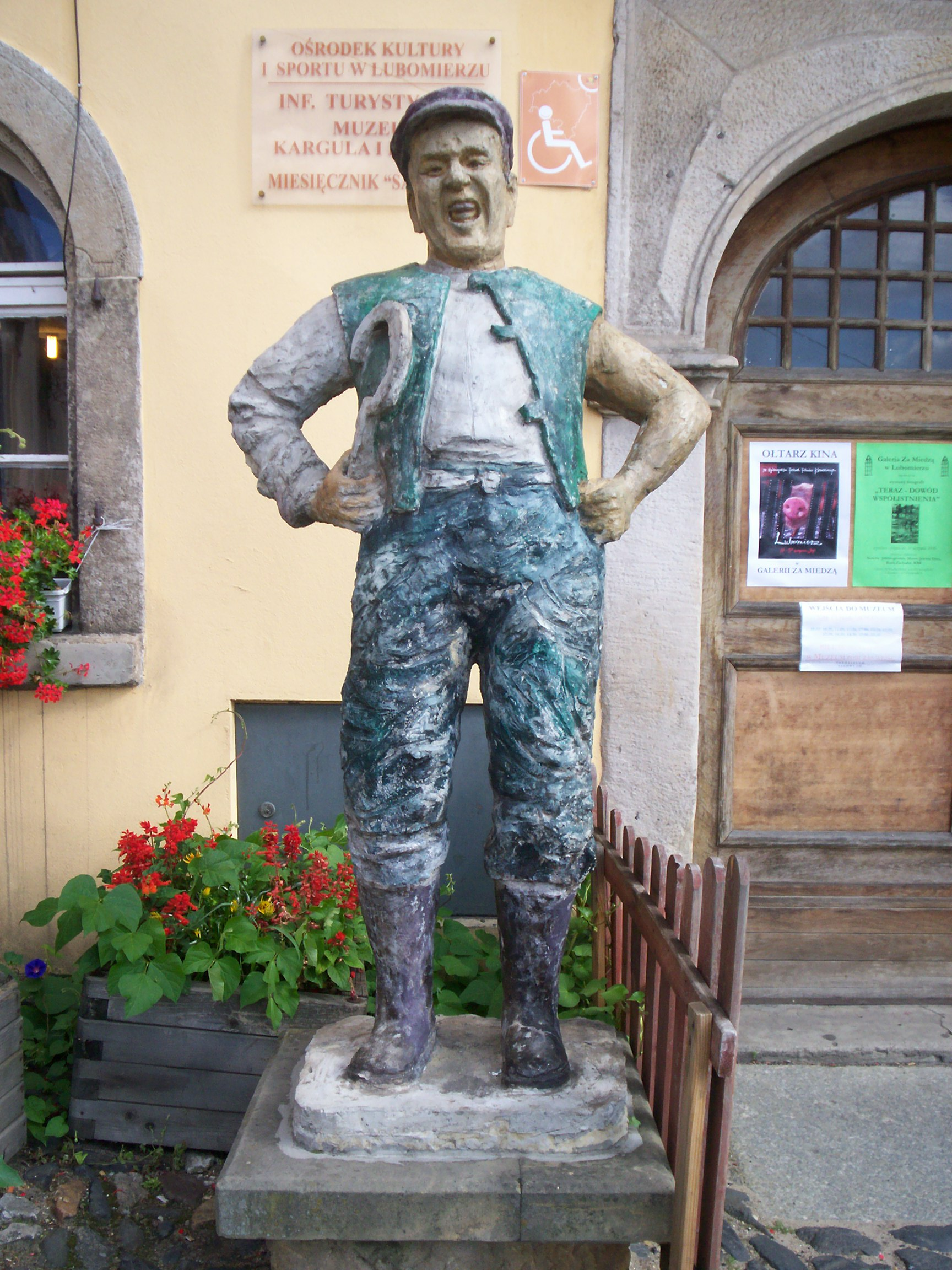 Lubomierz, muzeum Kargula i Pawlaka.